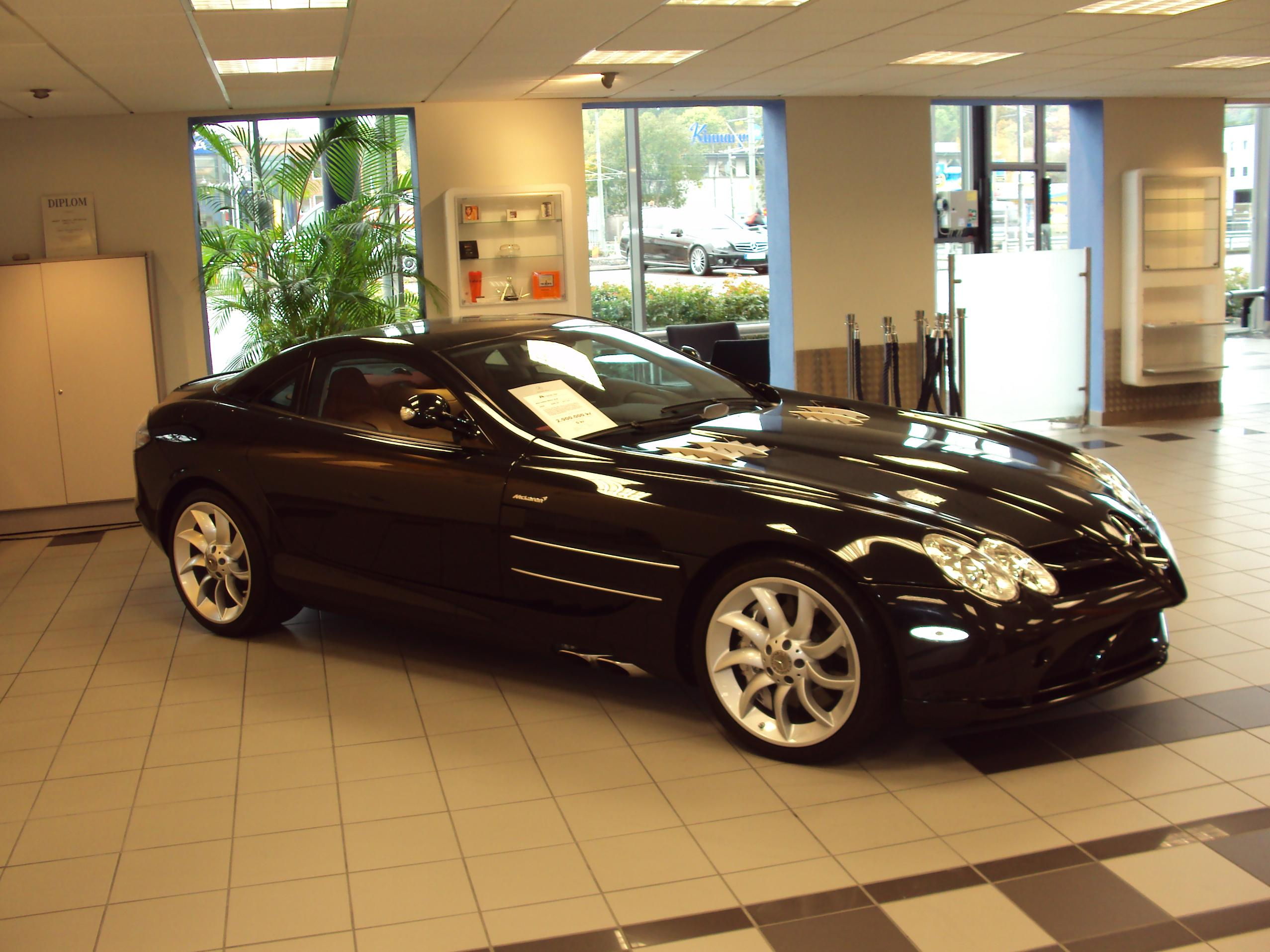 Mercedes-Benz Mclaren SLR